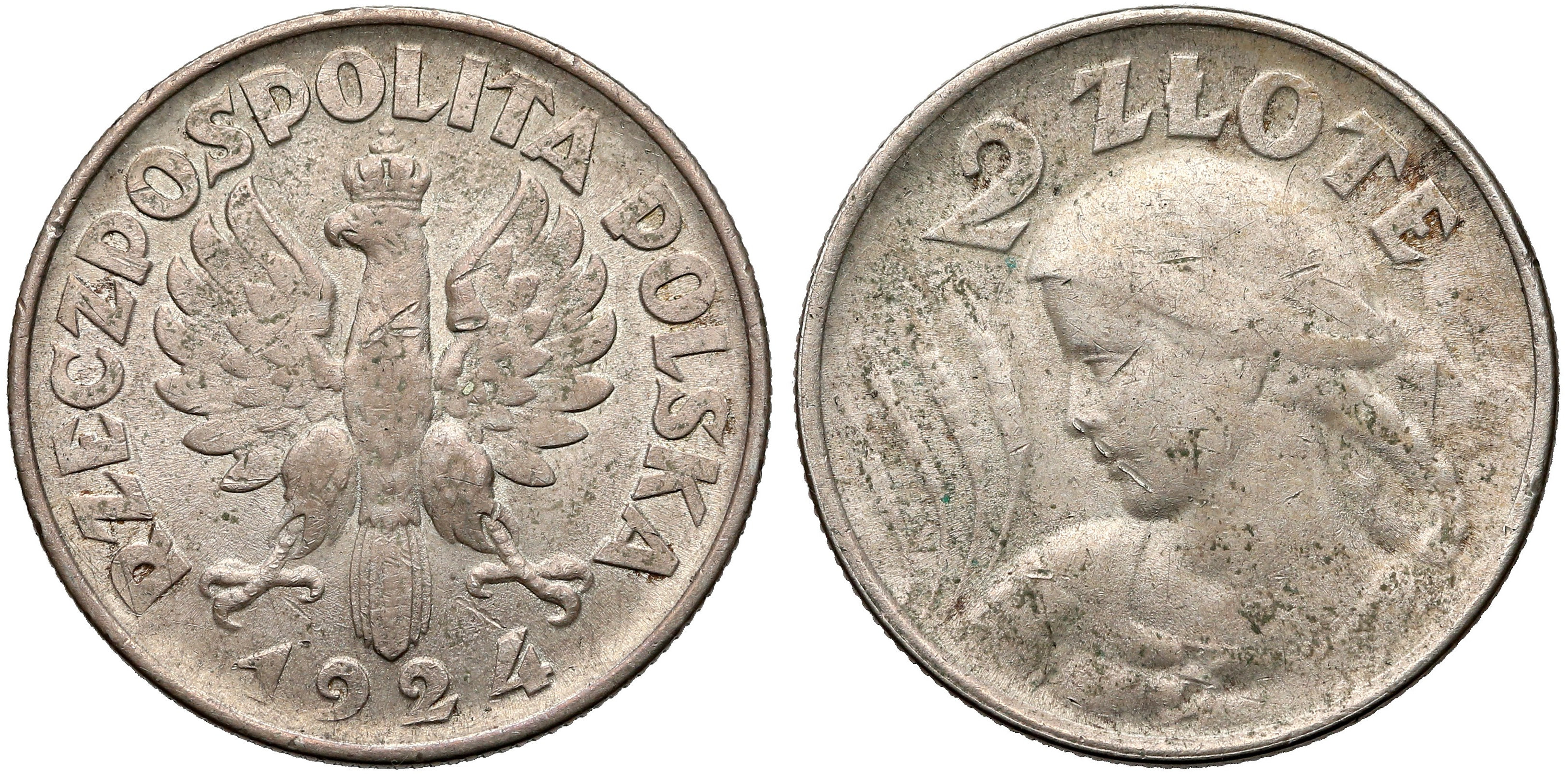 Próba 2 złote 1924 bez znaków mennicy srebro